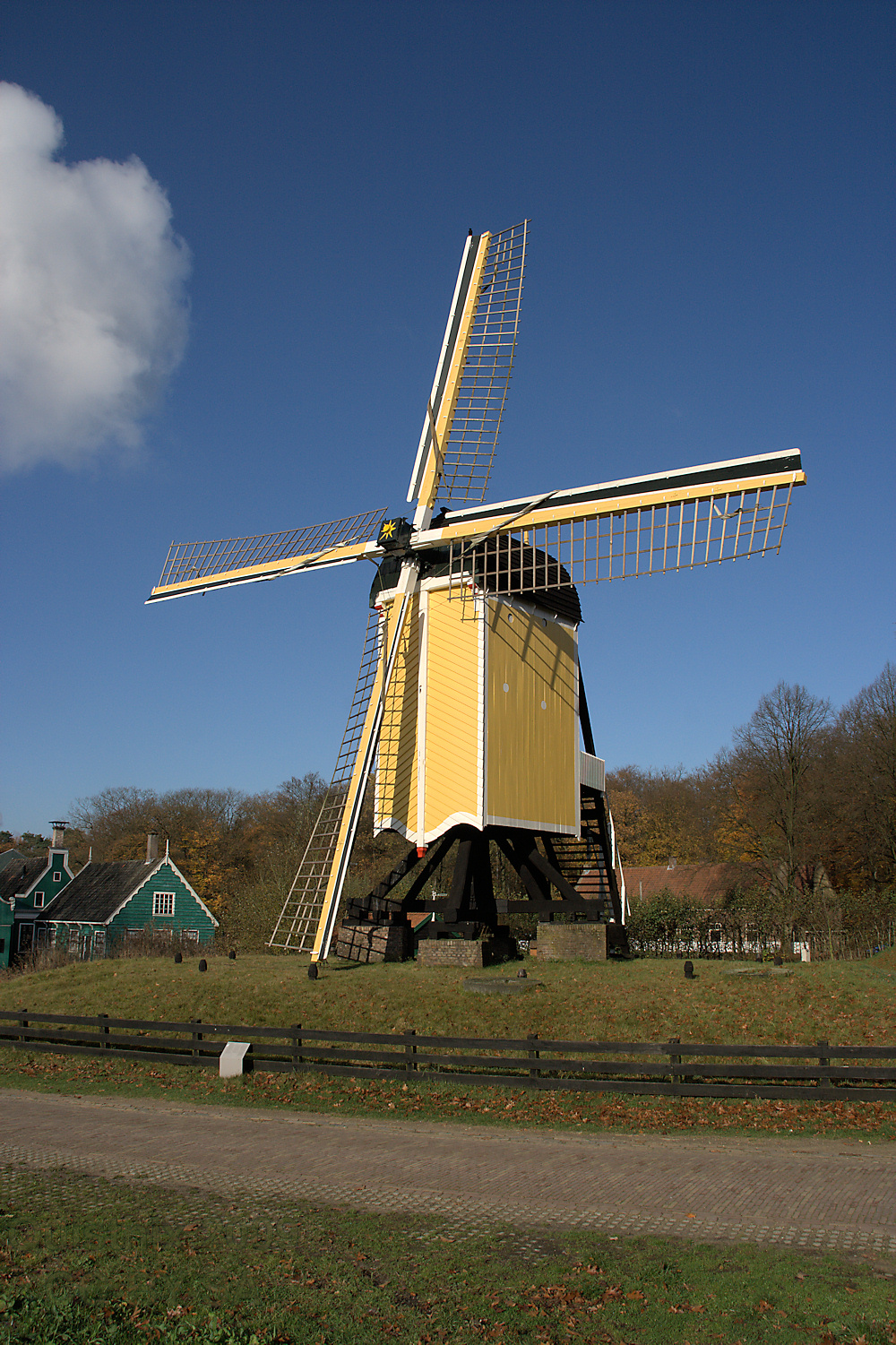 Arnhem: Nederlands Openluchtmuseum -Voorheen: Huizermolen in de herfst